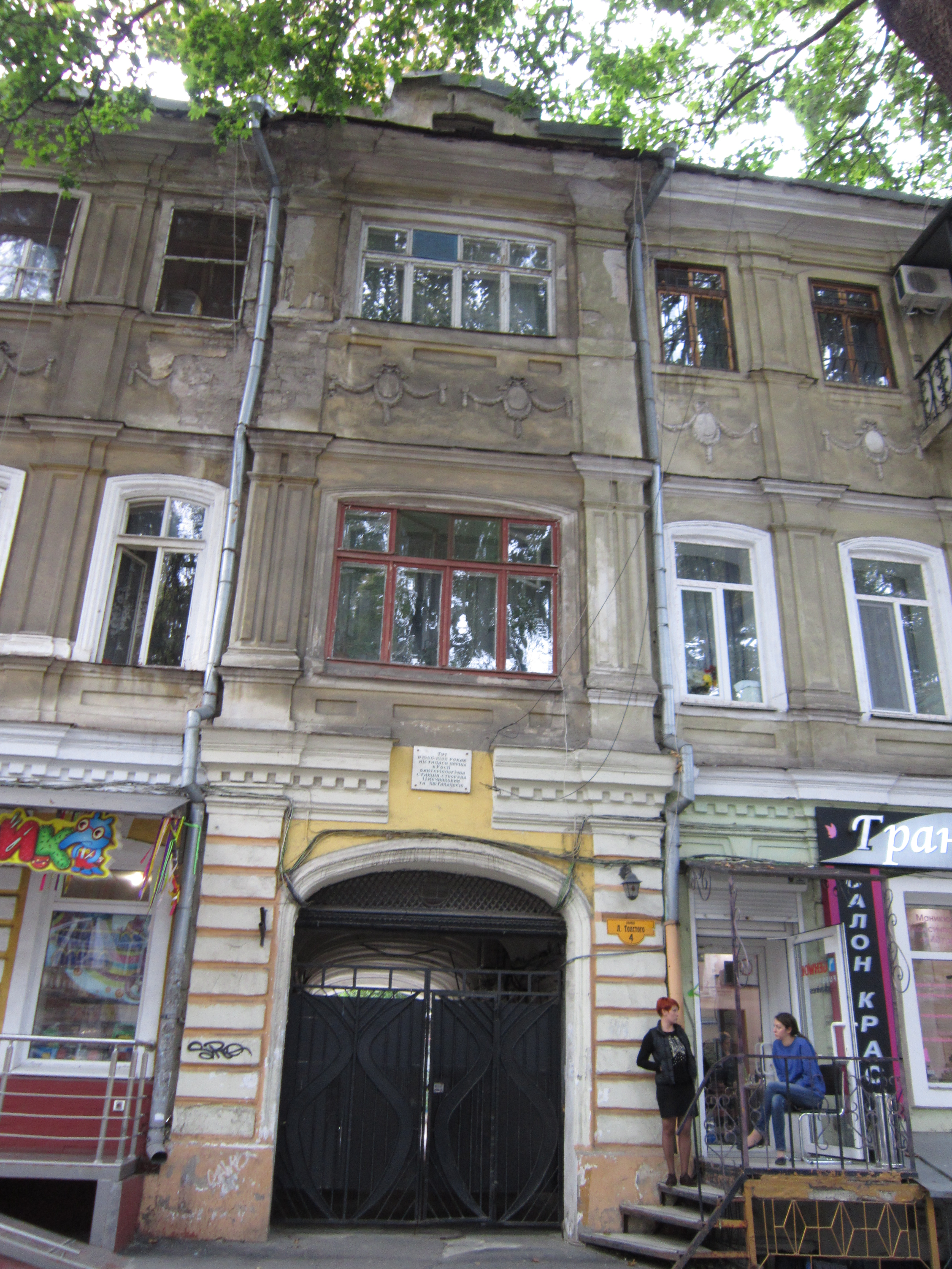 Будинок, де містилася перша в Росії, друга в світі бактеріологічна станція, яку заснував М. Гамалея на кошти Г. Маразлі, Одеса, Льва Толстого вул., 4